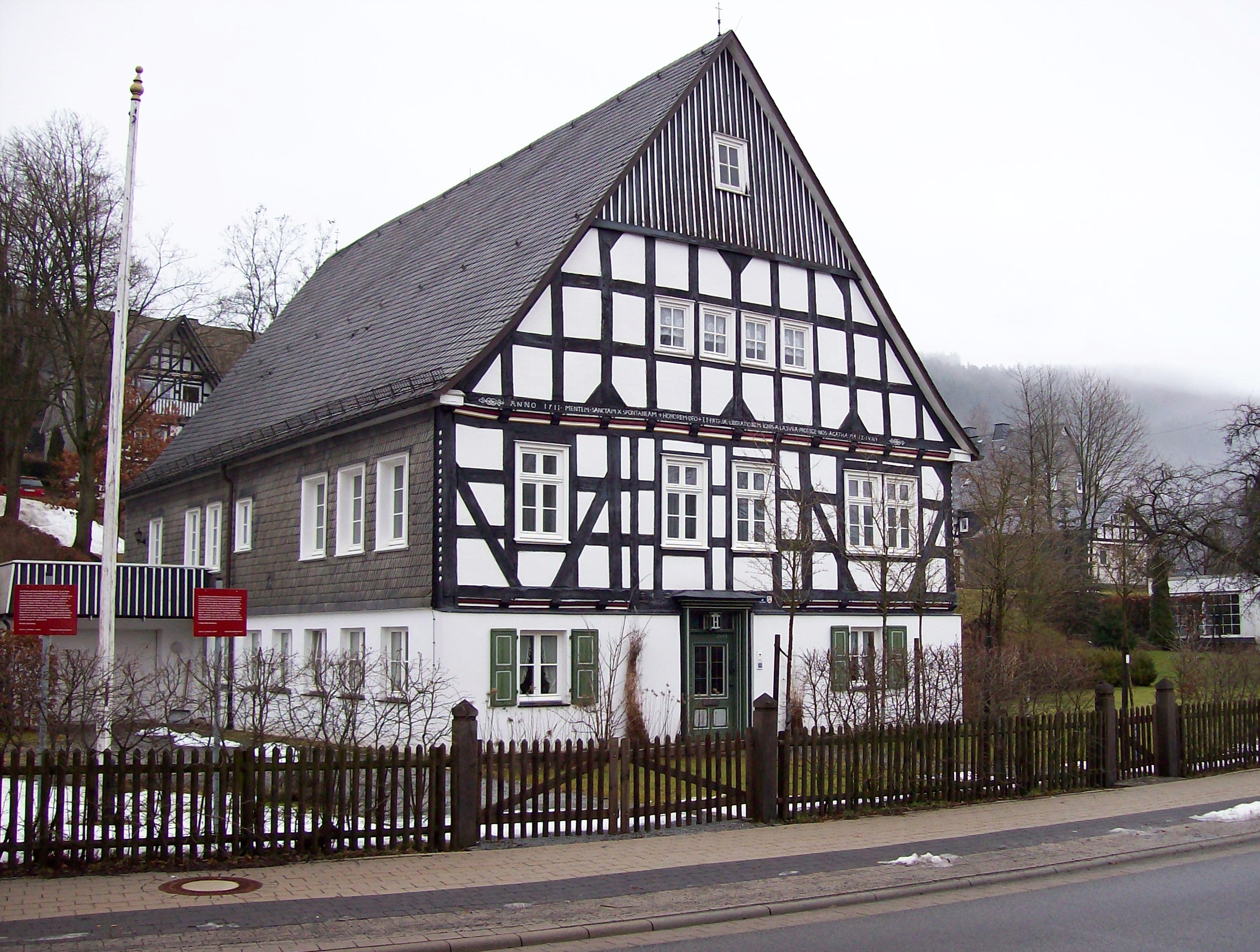 Denkmalgeschütztes Pfarrhaus in Schmallenberg-Oberkirchen